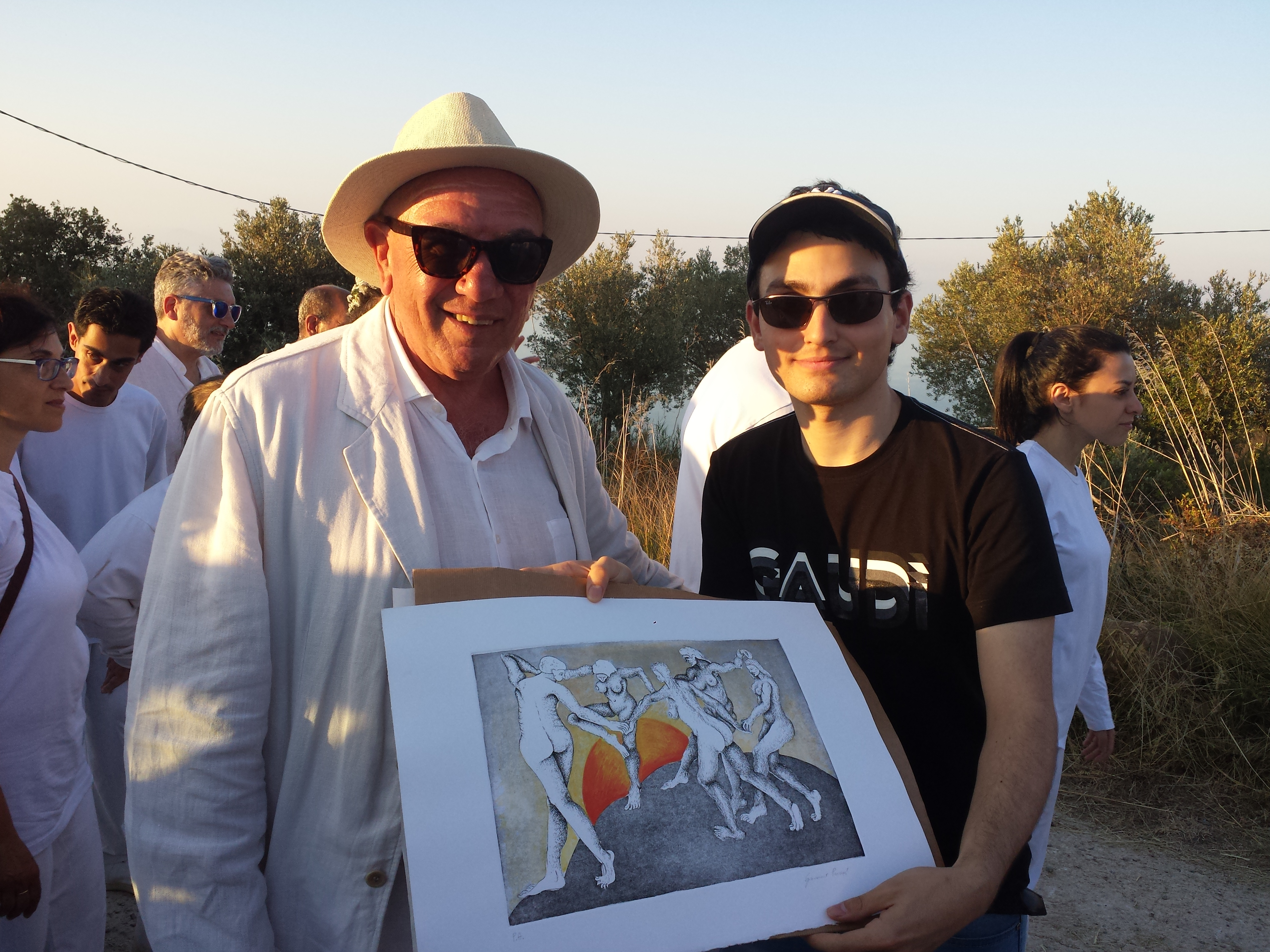 Antonio Presti e Giovanni Prinzi con la sua opera "Danza della luce" durante il "Rito della luce 2017", alla "Piramide 38° Parallelo" Sicilia - Motta d'Affermo (ME)